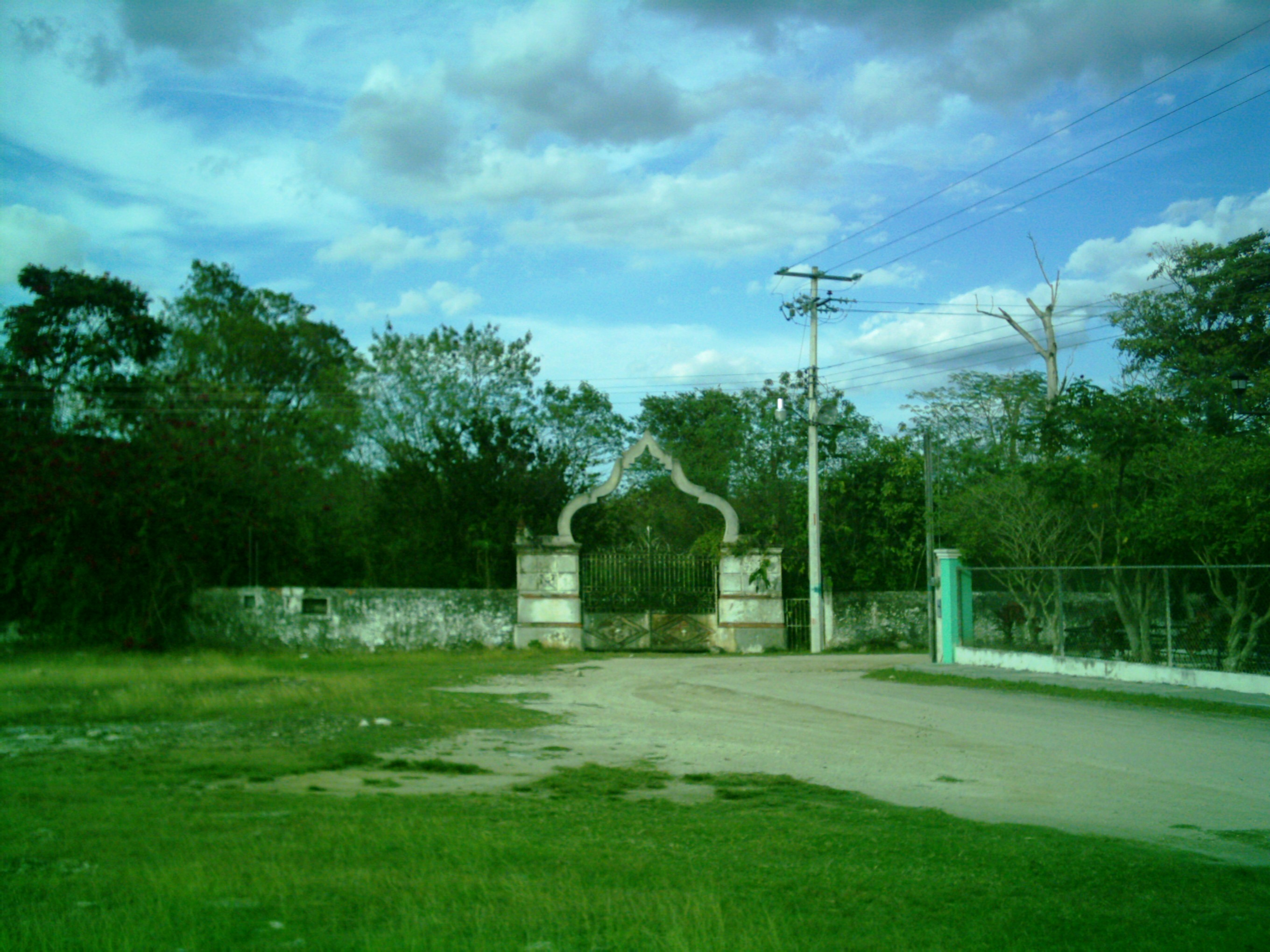 Hacienda de Santa Cruz (Municipio de Tixkokob), Yucatán.